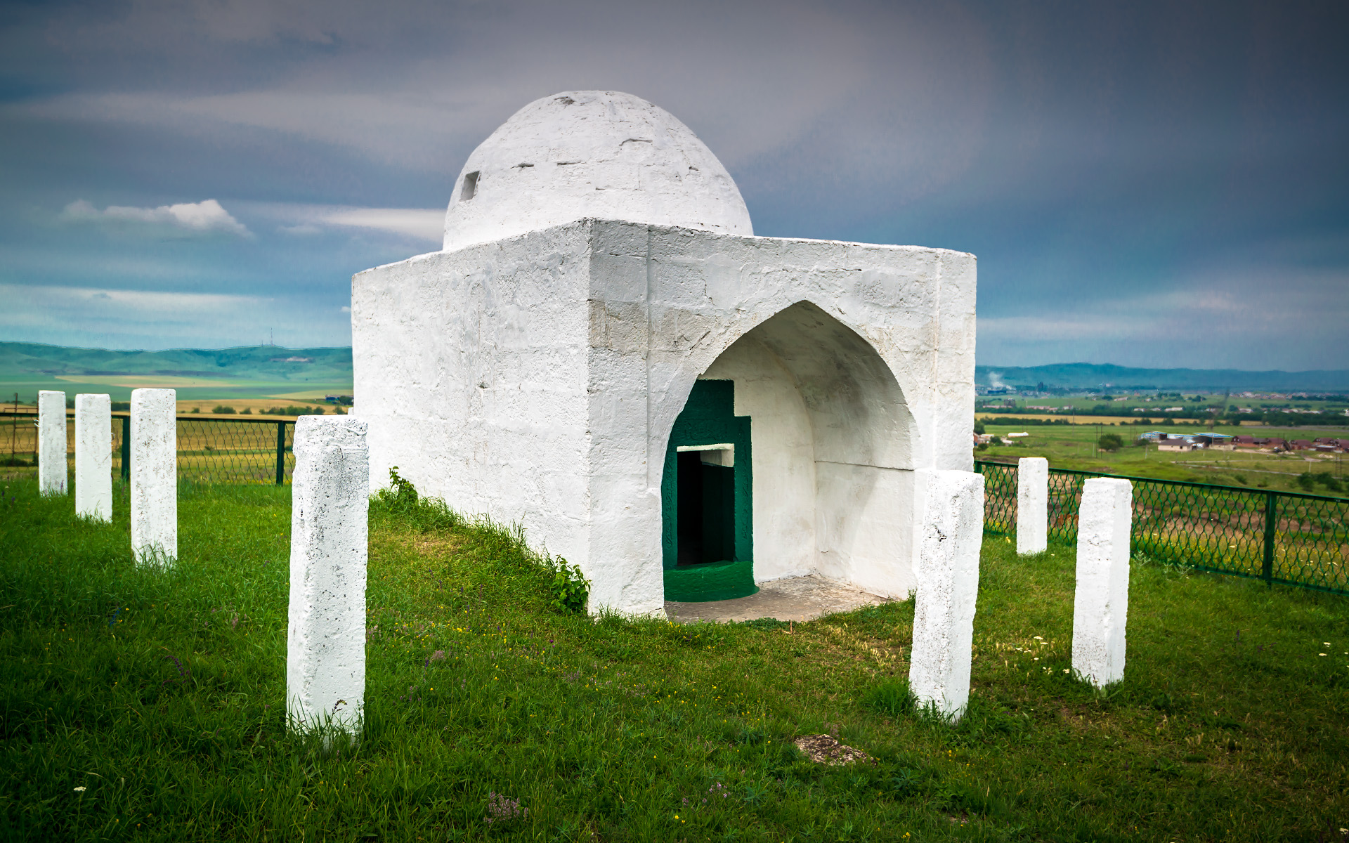 Мавзолей «Борга-Каш» (Республика Ингушетия, Карабулак, севернее села Плиево, на холме Гора Шейха)